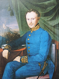 Ernst von Gemmingen junior (1794–1838), Sohn von Ernst von Gemmingen-Hornberg